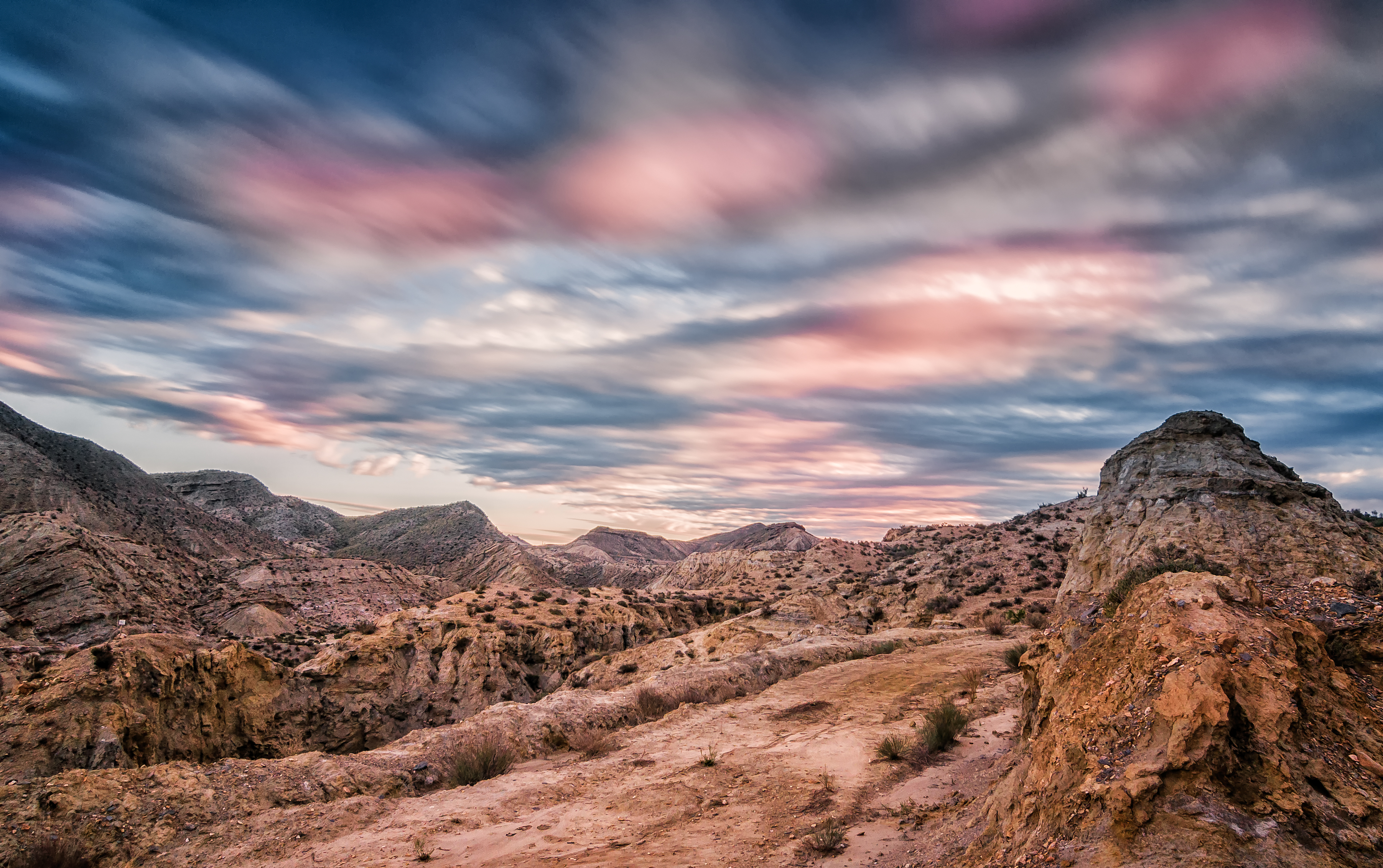 Amanecer con nubes dispersas y doradas por la larga exposición en una mañana en el desierto. This is a photography of a Site of Community Importance in Spain with the ID: ES0000047. Natura2000 entry, EEA entry